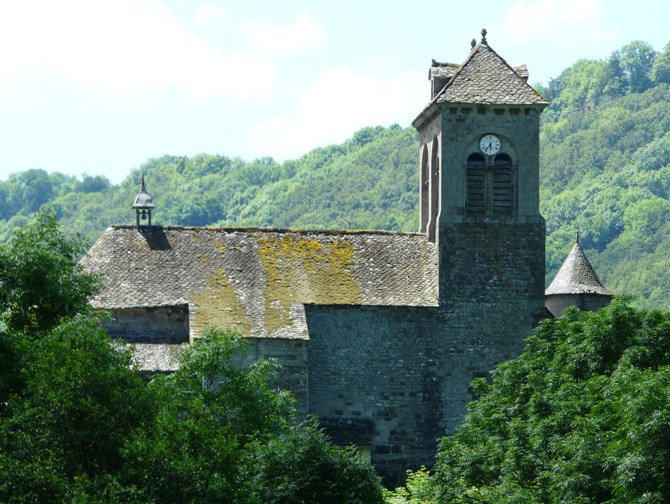 L'église de Brezons, Cantal, France.